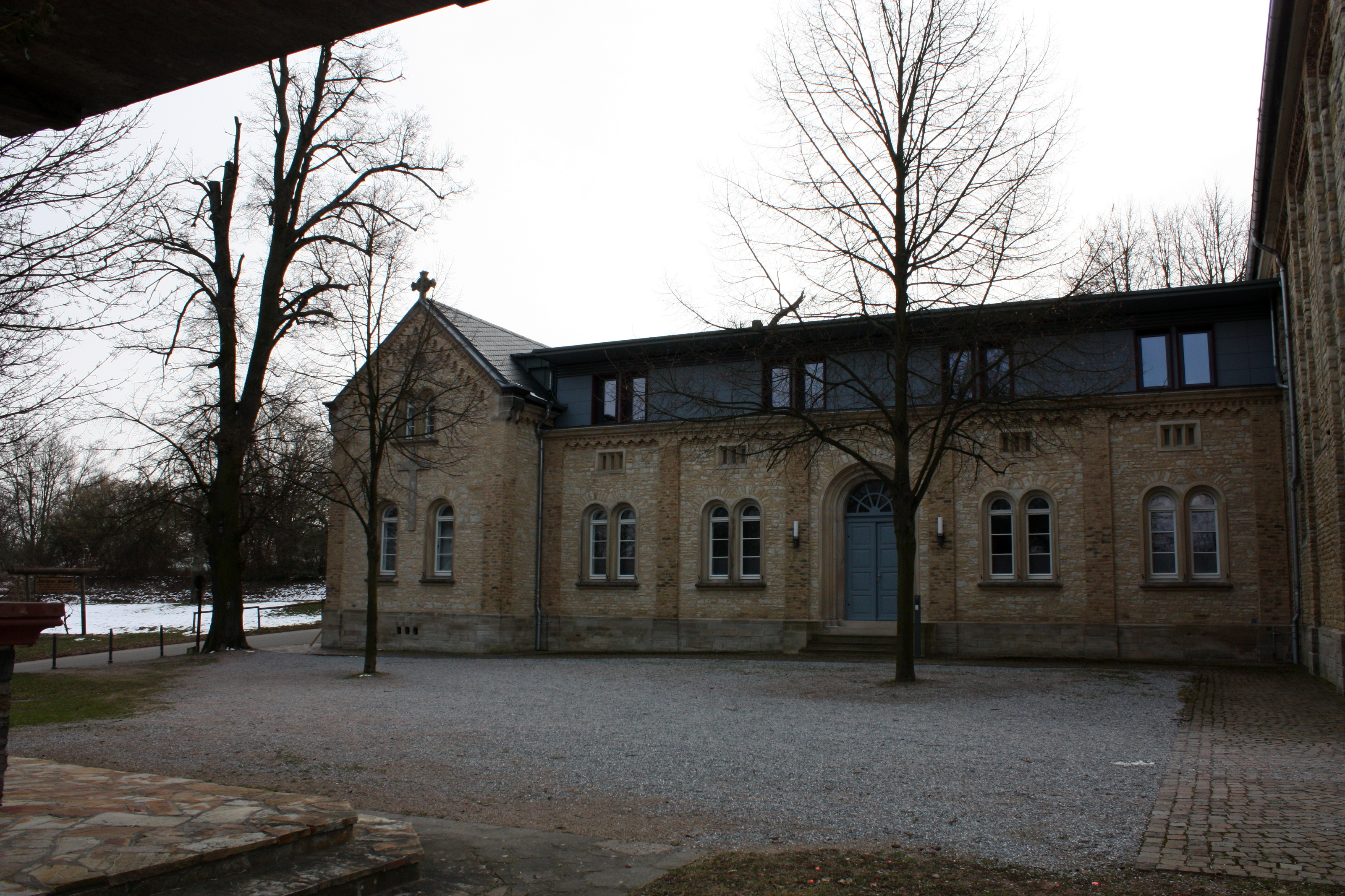 Haus St. Christoph, Priorats Jakobsberg, Ockenheim, Deutschland